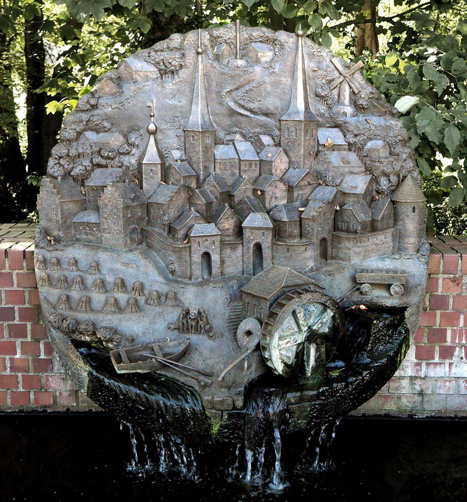 Schermbeck, NRW, Brunnen, Foto: Oktober 2015